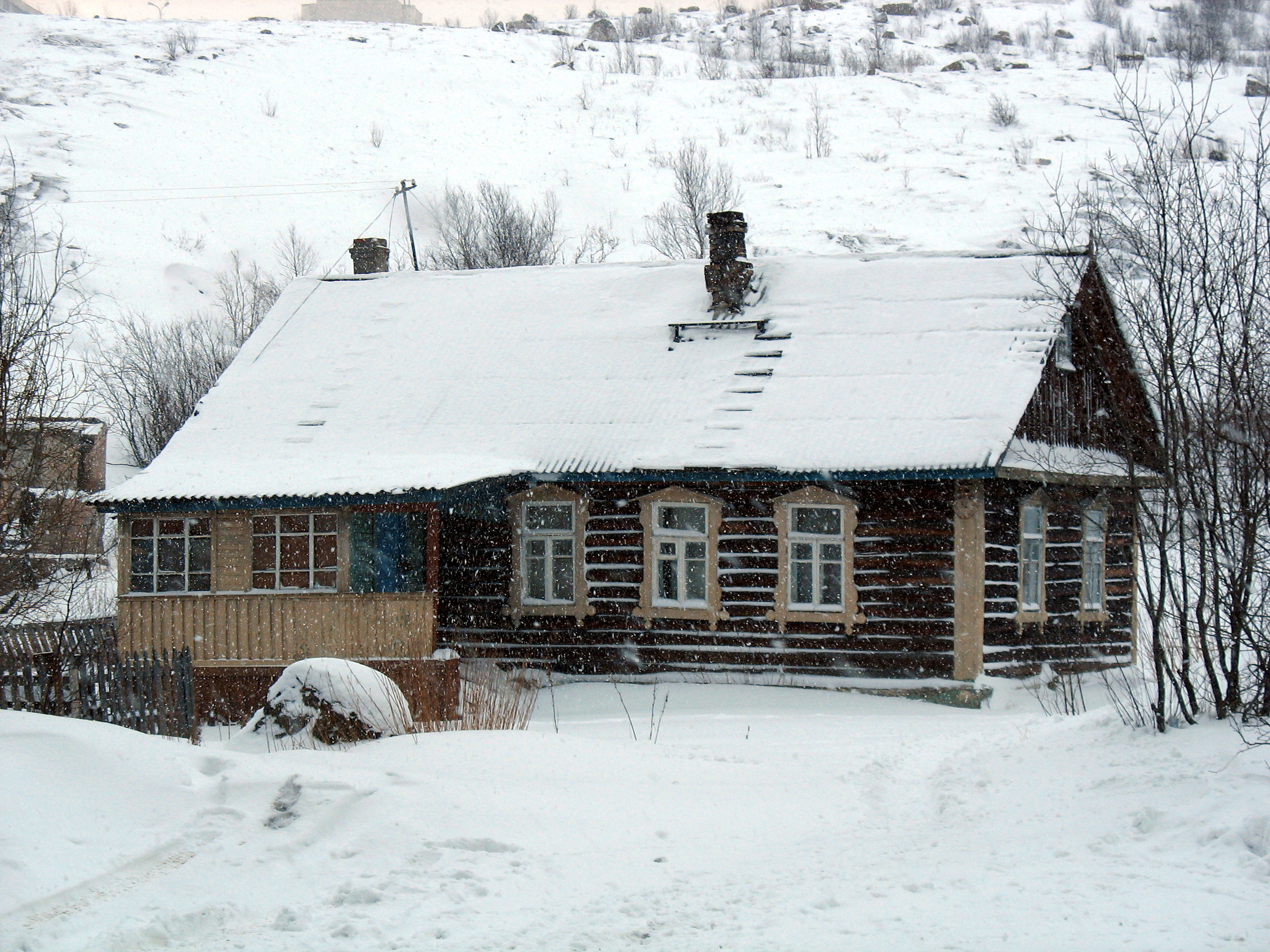 Дом на Жилстрое